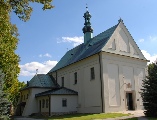 kościół parafialny p.w. Narodzenia św. Jana Chrzciciela, 1738-49 Chełm, Bochnia (gmina wiejska)